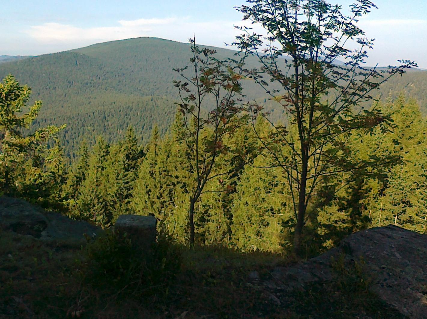 Widok ze szczytu góry Pytlák na górę Černý vrch